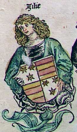 Celjští